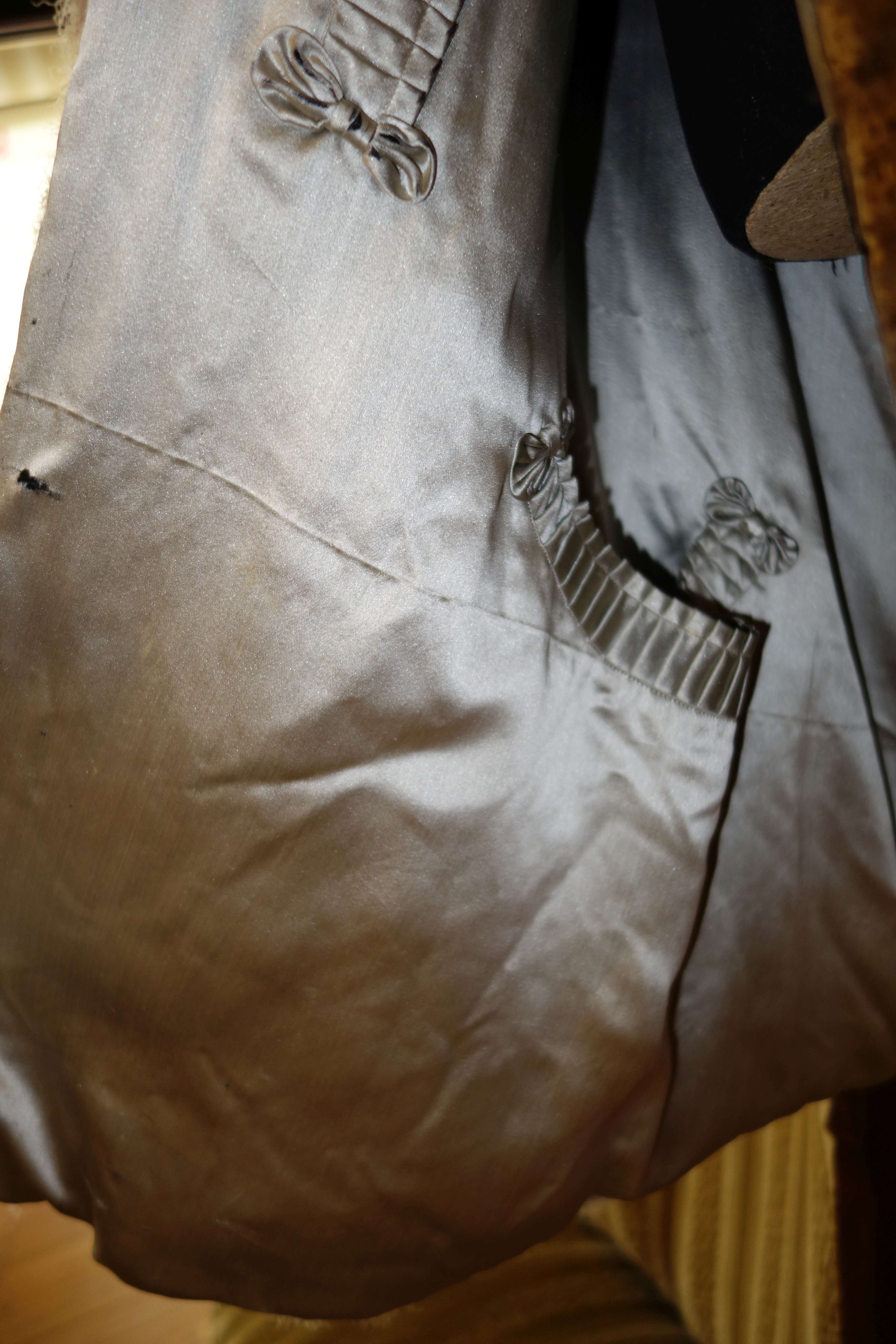 Clara Schumanns Schwanenpelz. Clara Schumanns Schwanenpelz ist heute ein Teil der Sammlung der Clara-Schumann-Gedenkstätte im Schumannhaus Düsseldorf, in dem die Schumanns von 1852 bis 1855 wohnten. Clara Schumann (* 1819; † 1896, geborene Wieck), war eine deutsche Pianistin und Komponistin, sie war die Ehefrau des Komponisten Robert Schumann. Seidenfutter mit gefältetem Tascheneingriff mit Zierschleifenabschluss.